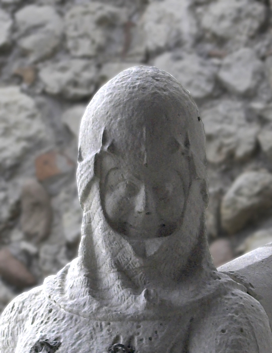 Primo piano del volto della statua equestre di Cangrande della Scala, proveniente dalla Arche scaligere di Verona, oggi conservata presso il Museo di Castelvecchio a Verona.